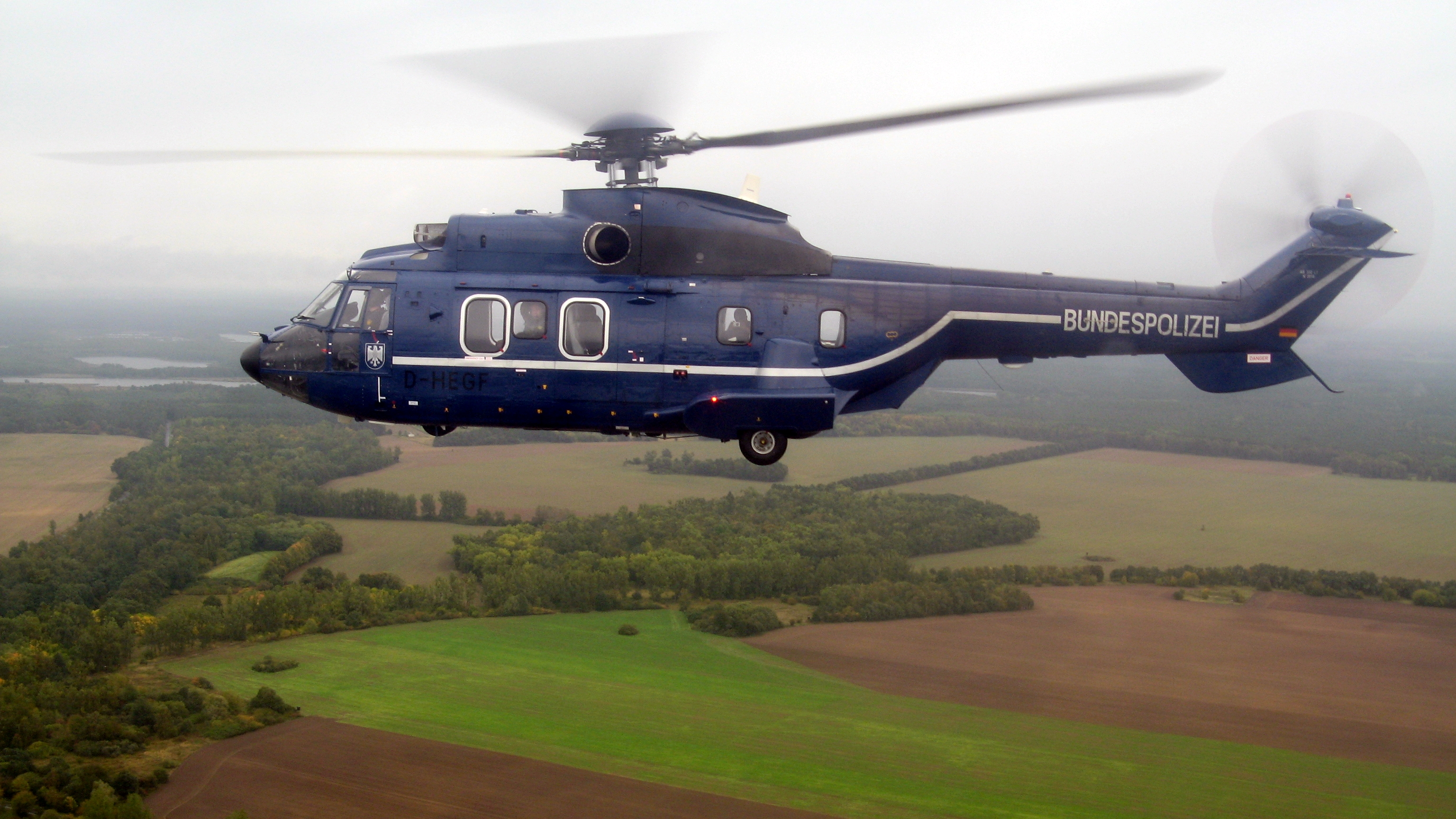 Eine Superpuma (Aérospatiale AS 332) der Bundespolizei